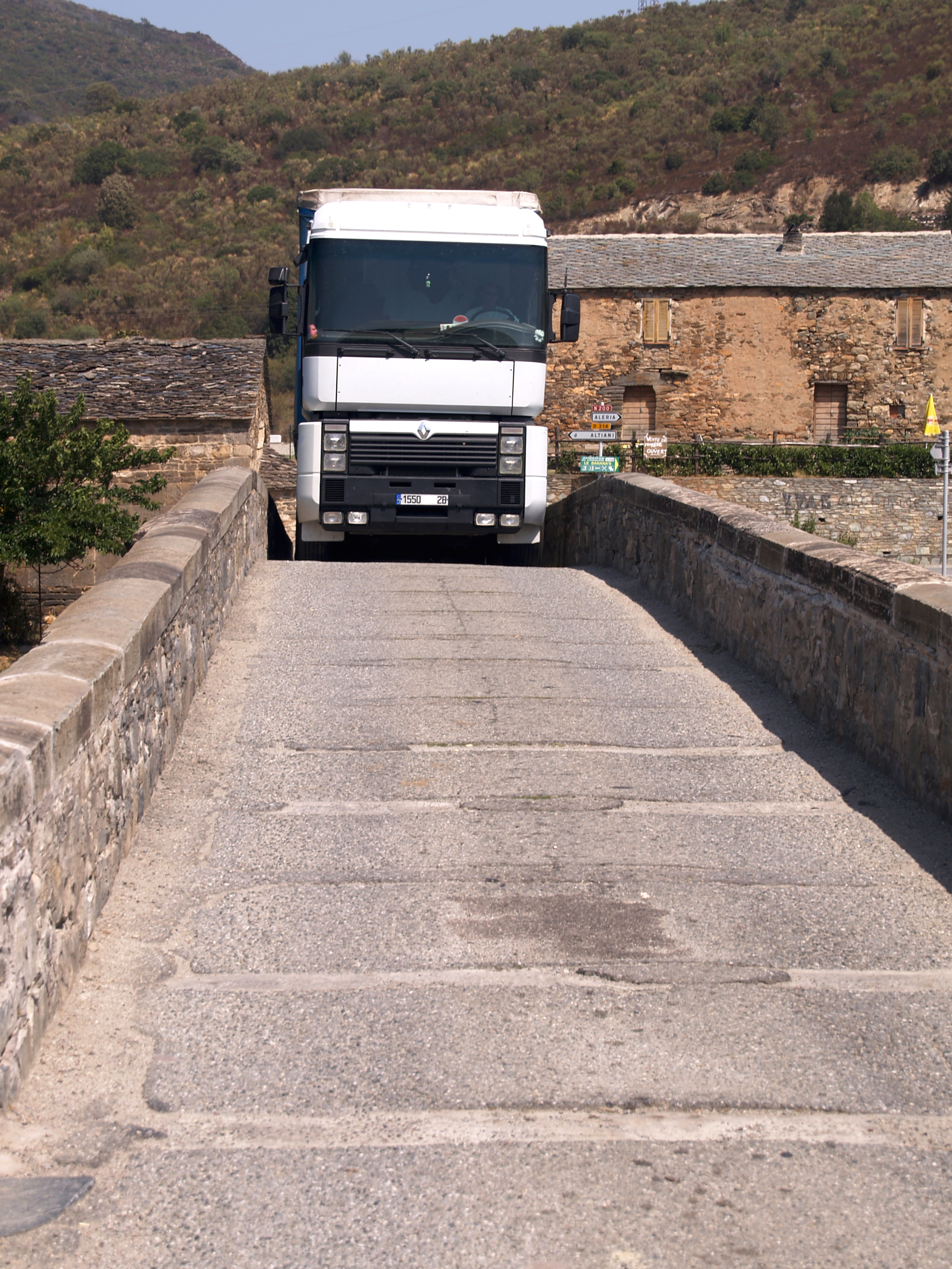 Altiani (Corsica) - Poids lourd sur le pont génois de la RN 200